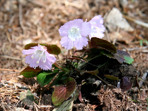 Shortia uniflora var. kantoensis